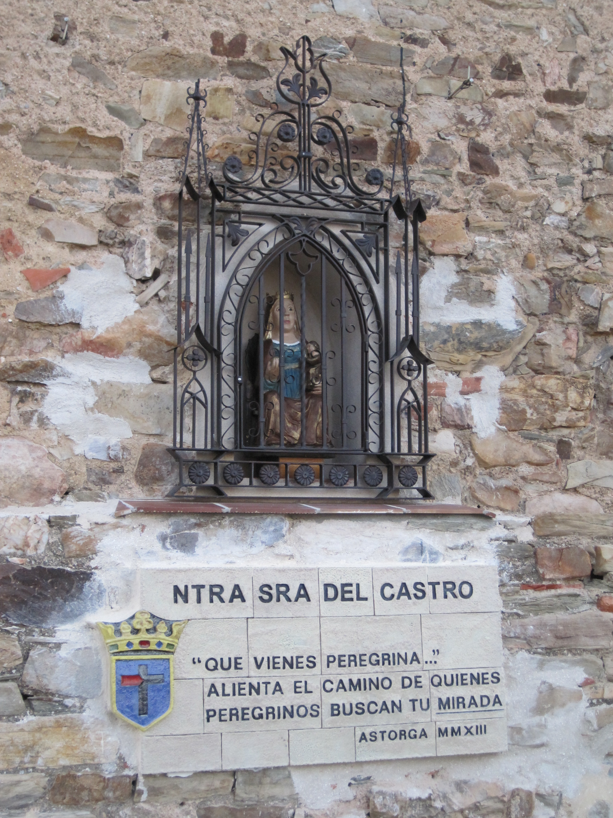 Réplica de la Virgen de Castrotierra, a la entrada de Astorga (provincia de León, España).